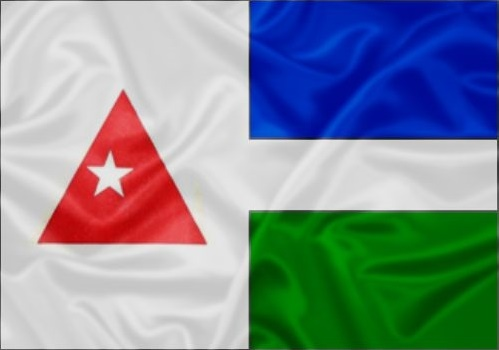 Bandeira Município de Abaeté